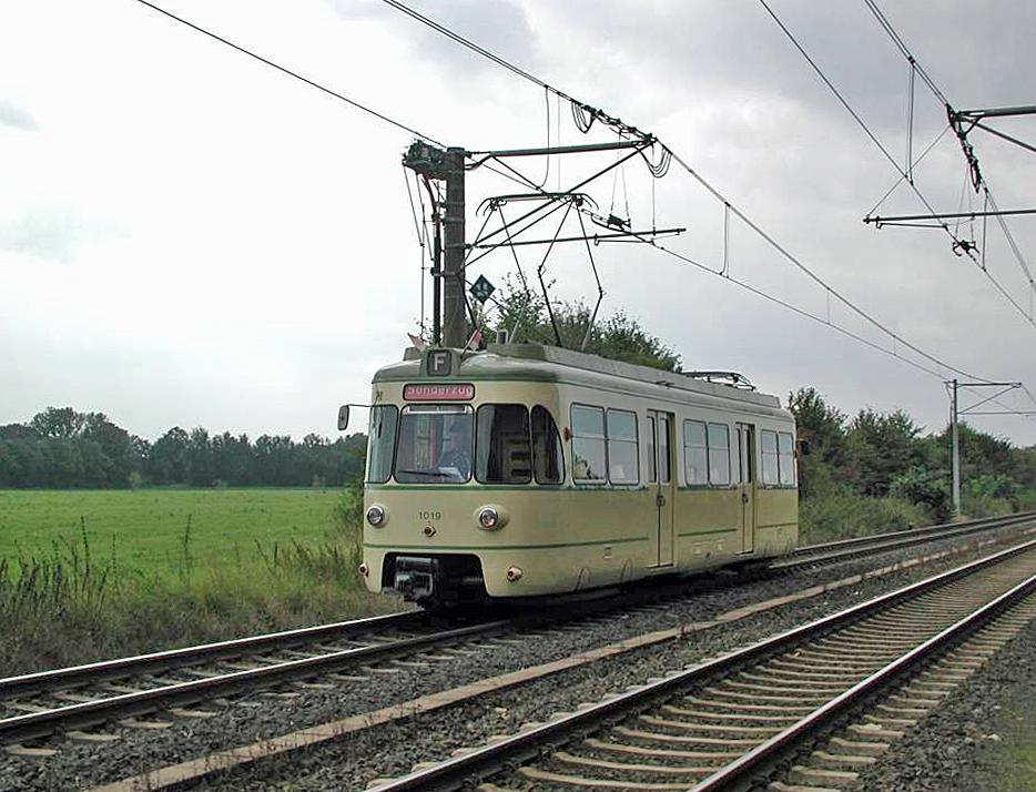 Museumswagen 1019 der KVB am Stüttgenhofen